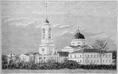 Валуйский Успенский Николаевский мужской монастырь. Литография